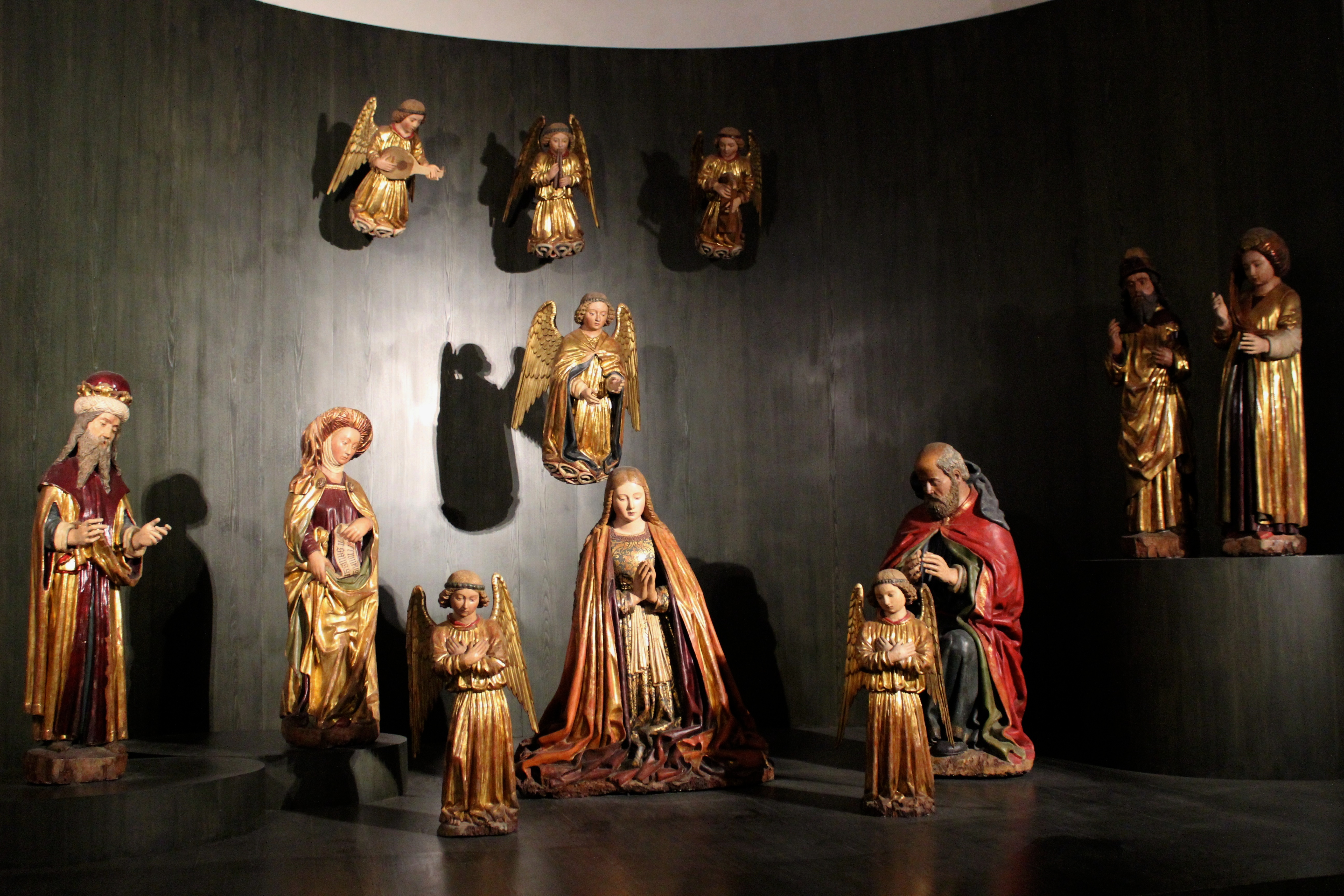 Figuras de Belén procedentes de la iglesia de San Giovanni a Carbonara. Nápoles, Museo di San Martino.